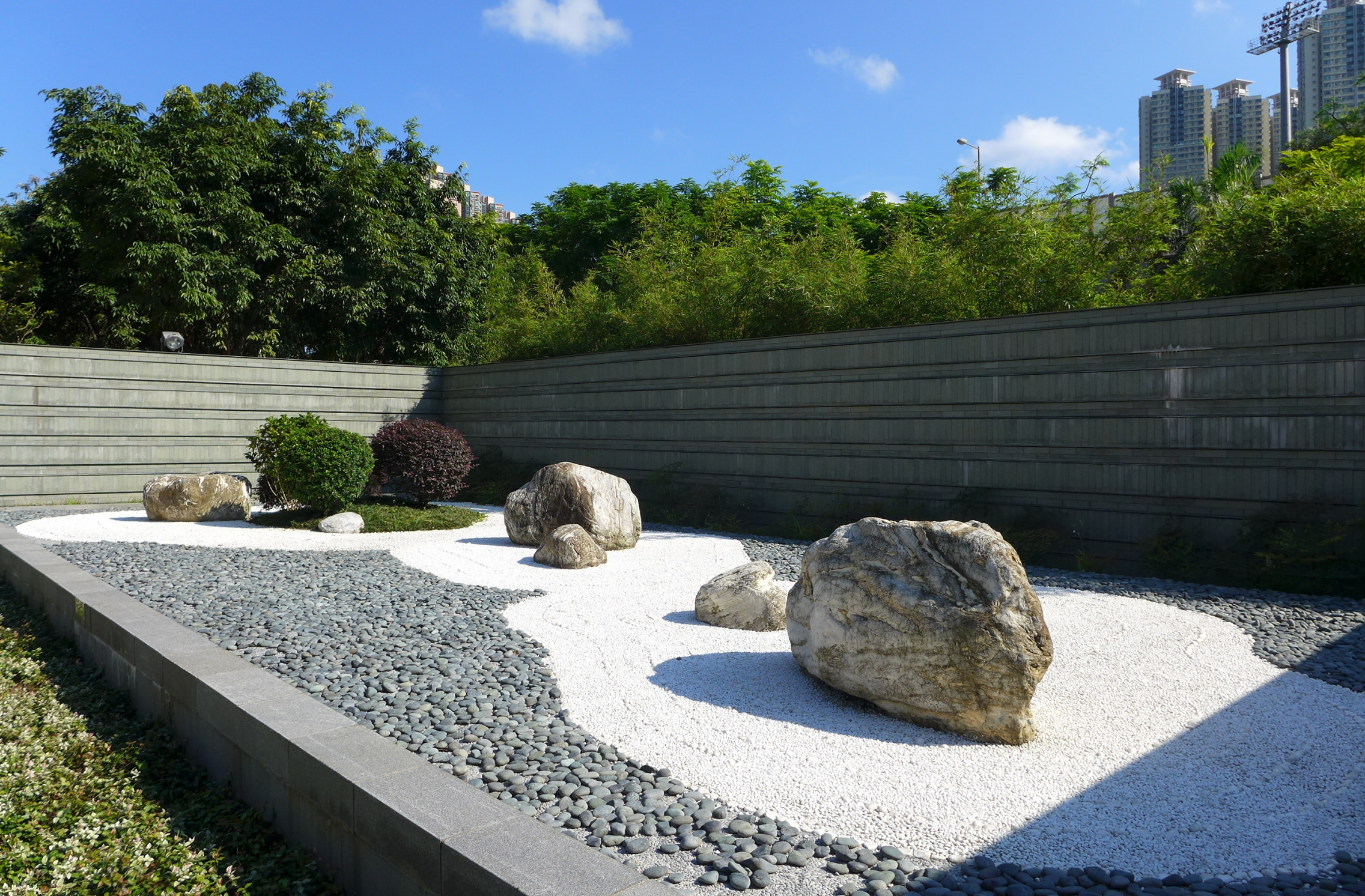 Man Kuk Lane Park Zen Garden